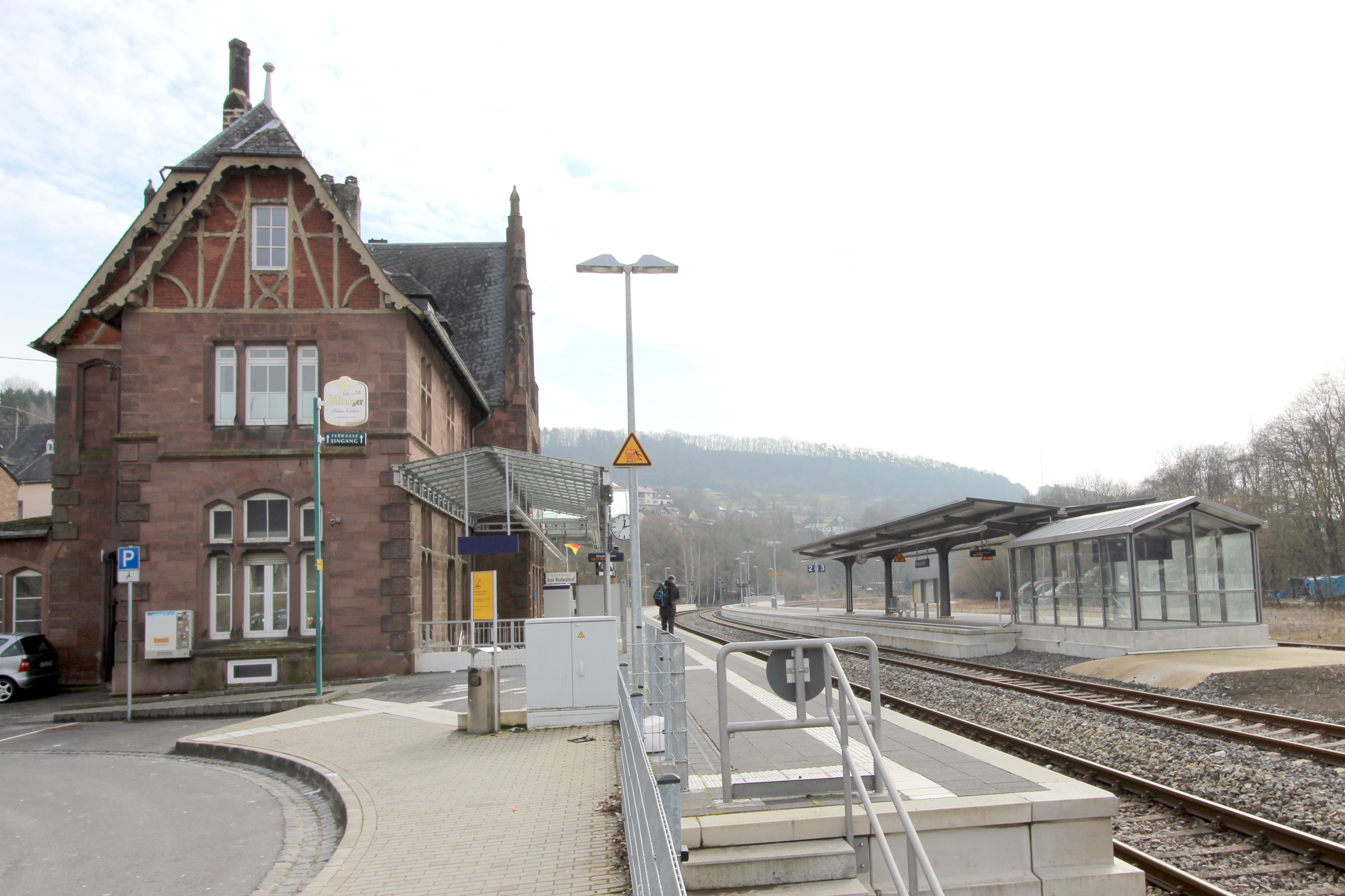 54634 Erdorf, Mainzer Straße 12. Bahnhof Erdorf der Eifelbahn; Empfangsgebäude, malerischer Rotsandsteinbau, teilweise Fachwerk, 1871. Aufnahme von 2018.